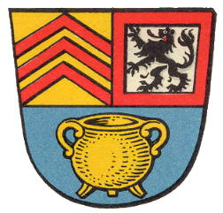 Altes Wappen der Ortschaft Langstadt (Hessen, Deutschland)